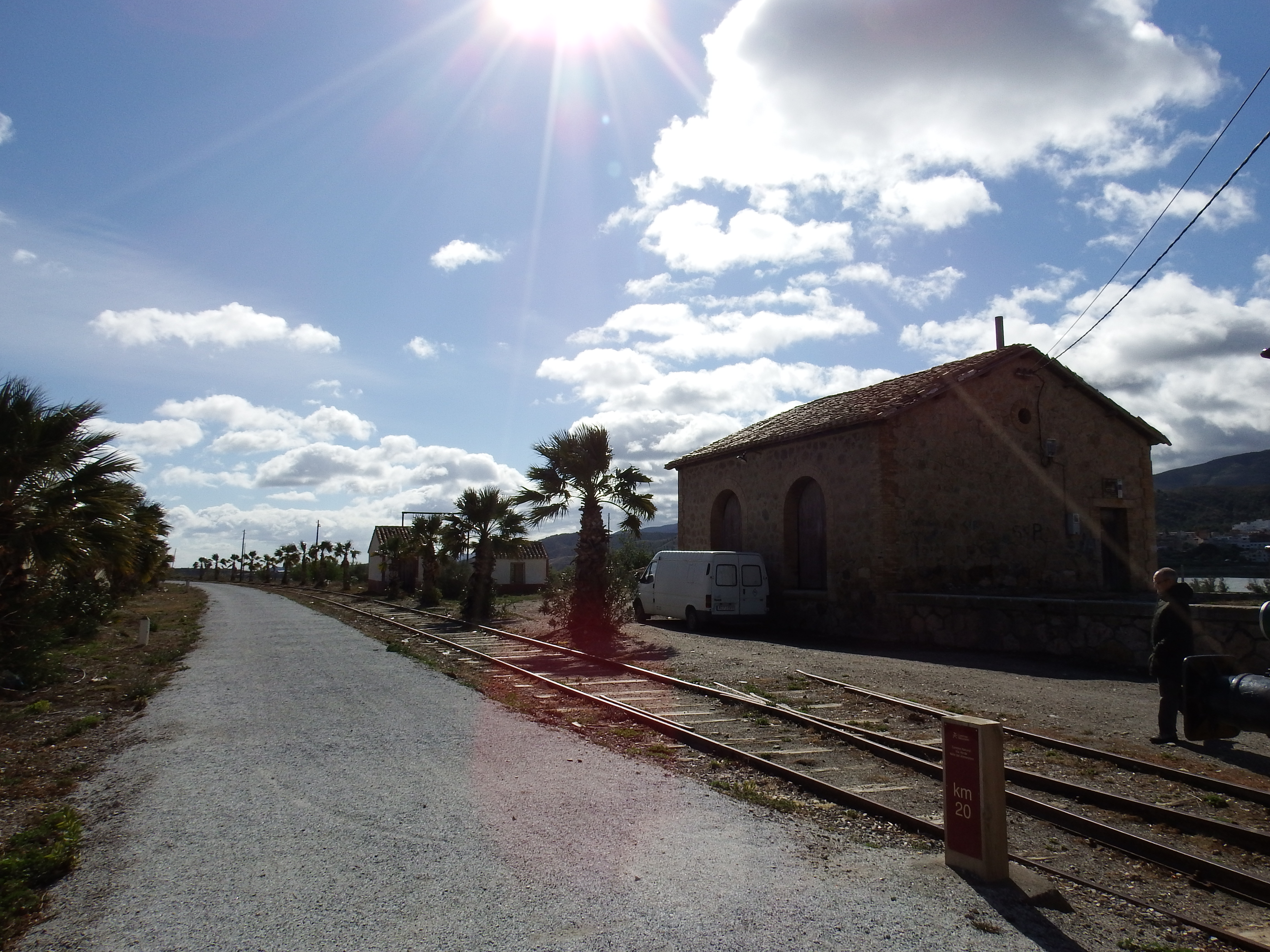 Estación de Tíjola